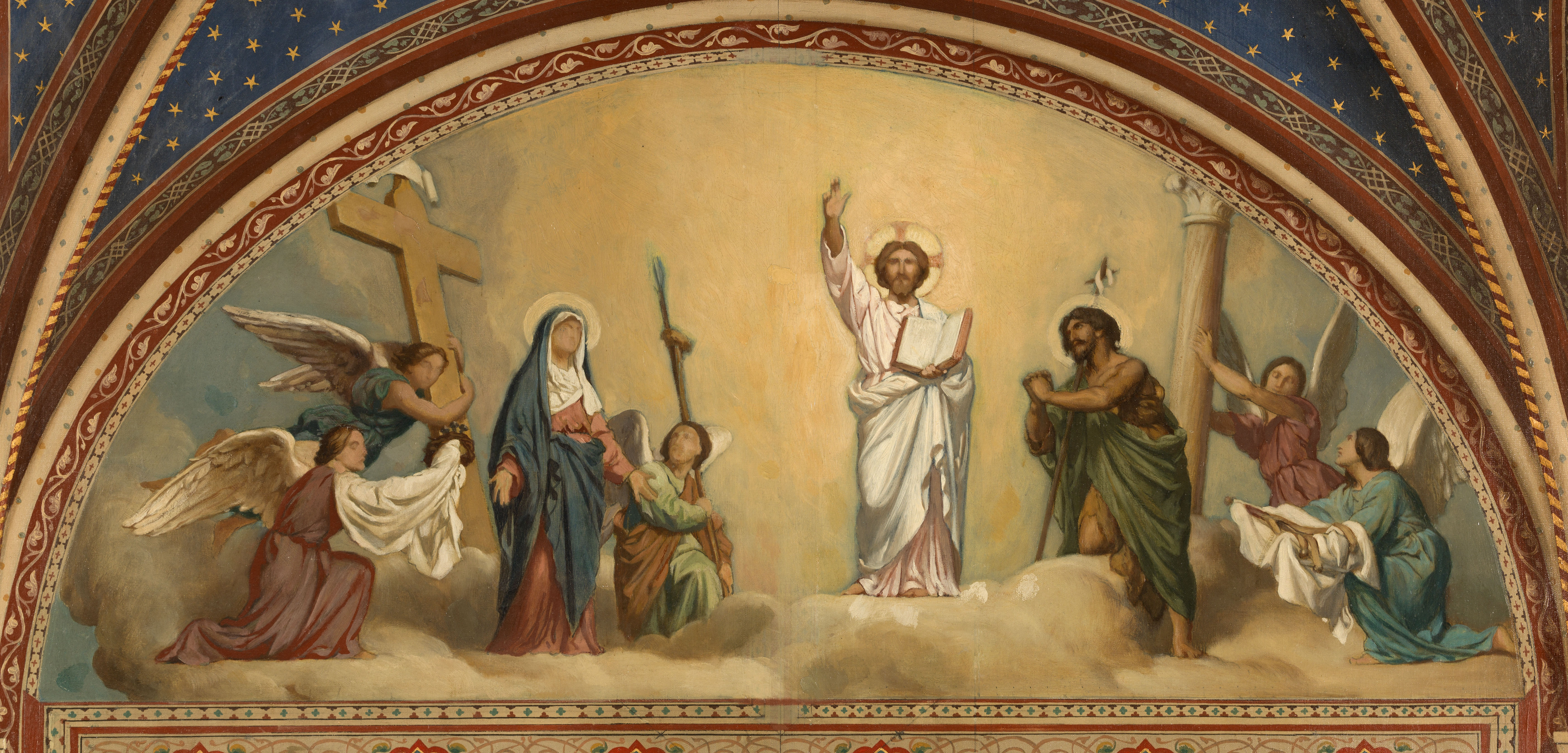 Esquisse pour l'eglise de Saint-Germain-des-Prés - Le Jugement Dernier